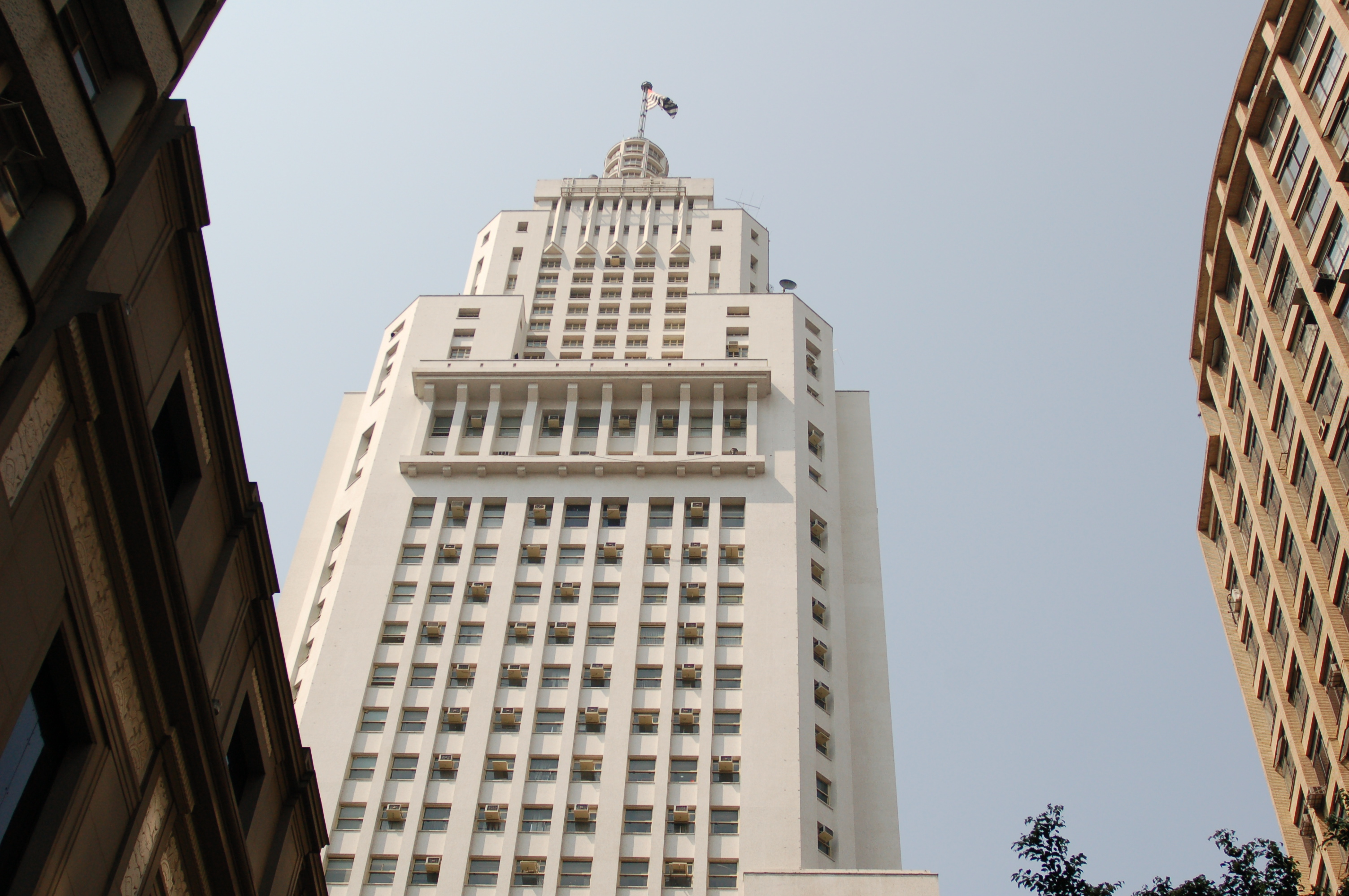 Banespa building in São Paulo, Brazil